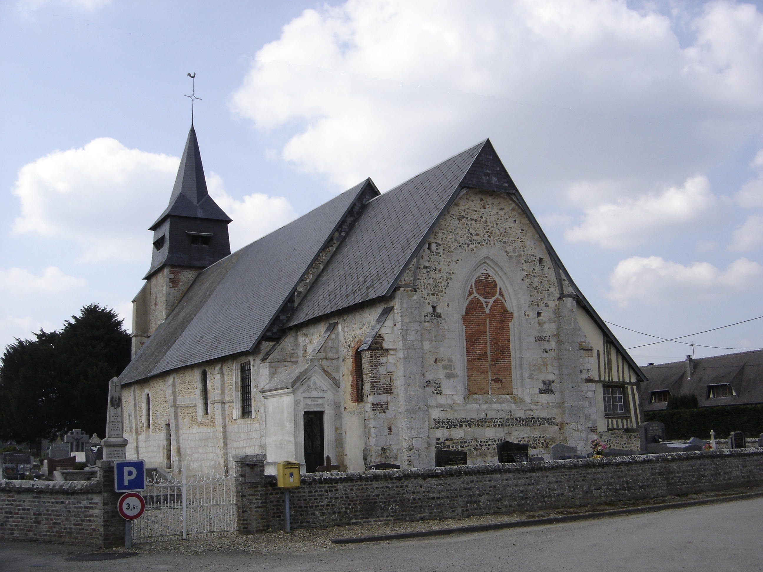 Église Saint-Denis à Vannecrocq - Eure - France (chevet)